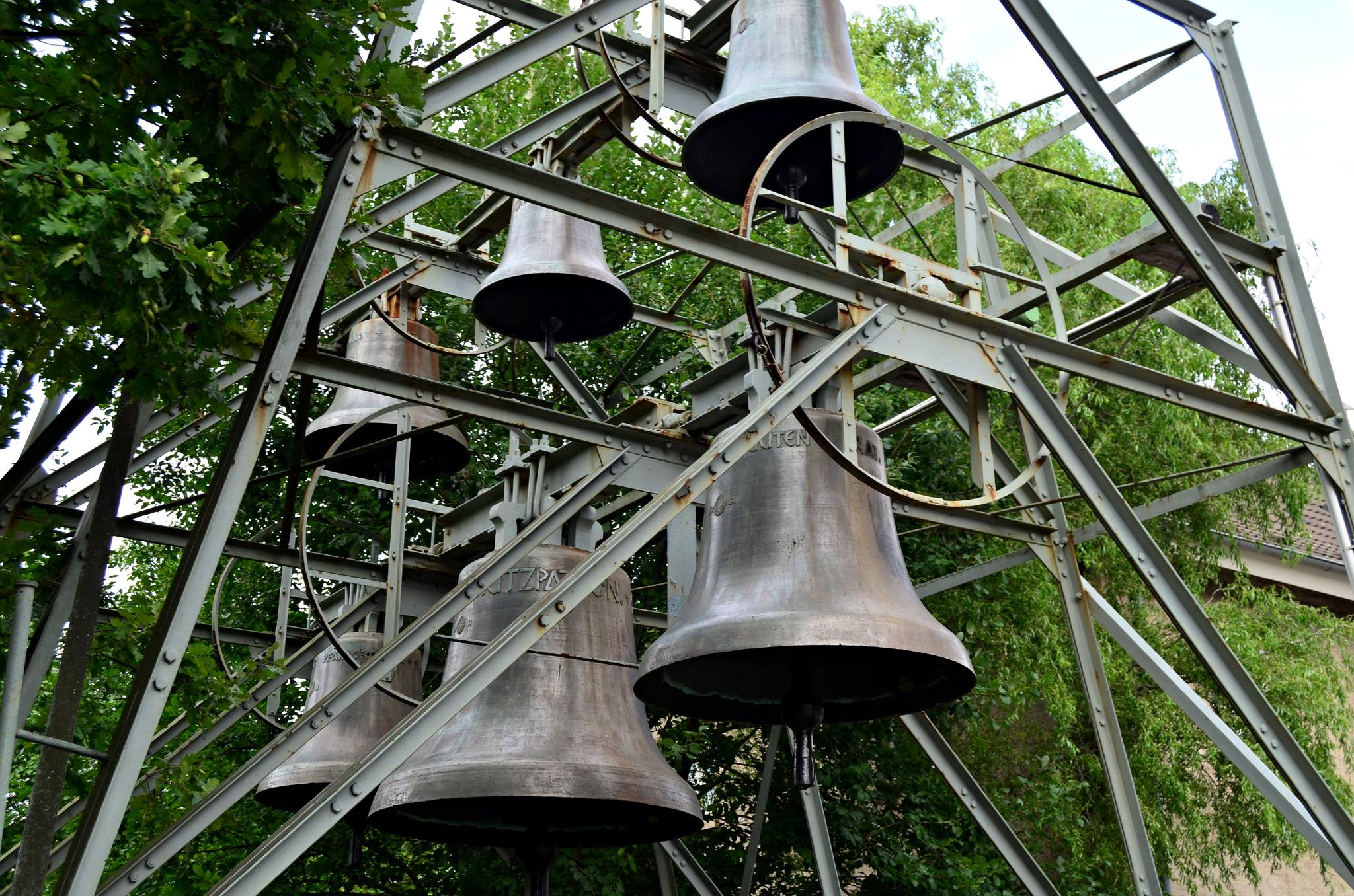 Ehemaliger Glockenstuhl der Pfarrkirche St. Josef in Essen-Kupferdreh